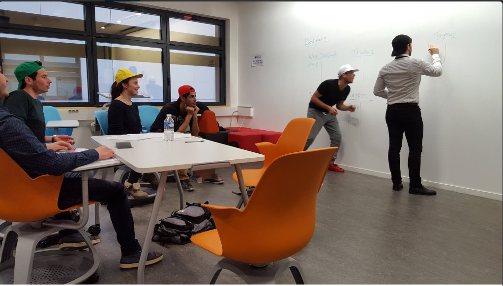 Chapeaux de Bono au Learning Lab de l'IUT de Béziers